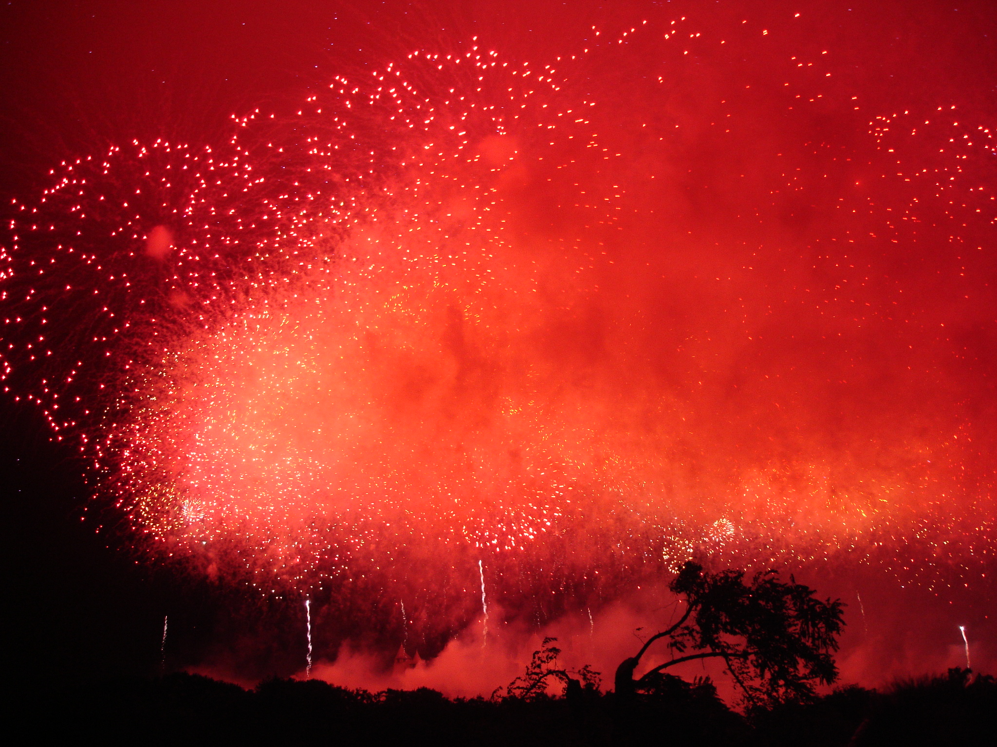 France, Aude (11), Carcassonne, embrasement de la cité au 14 julllet